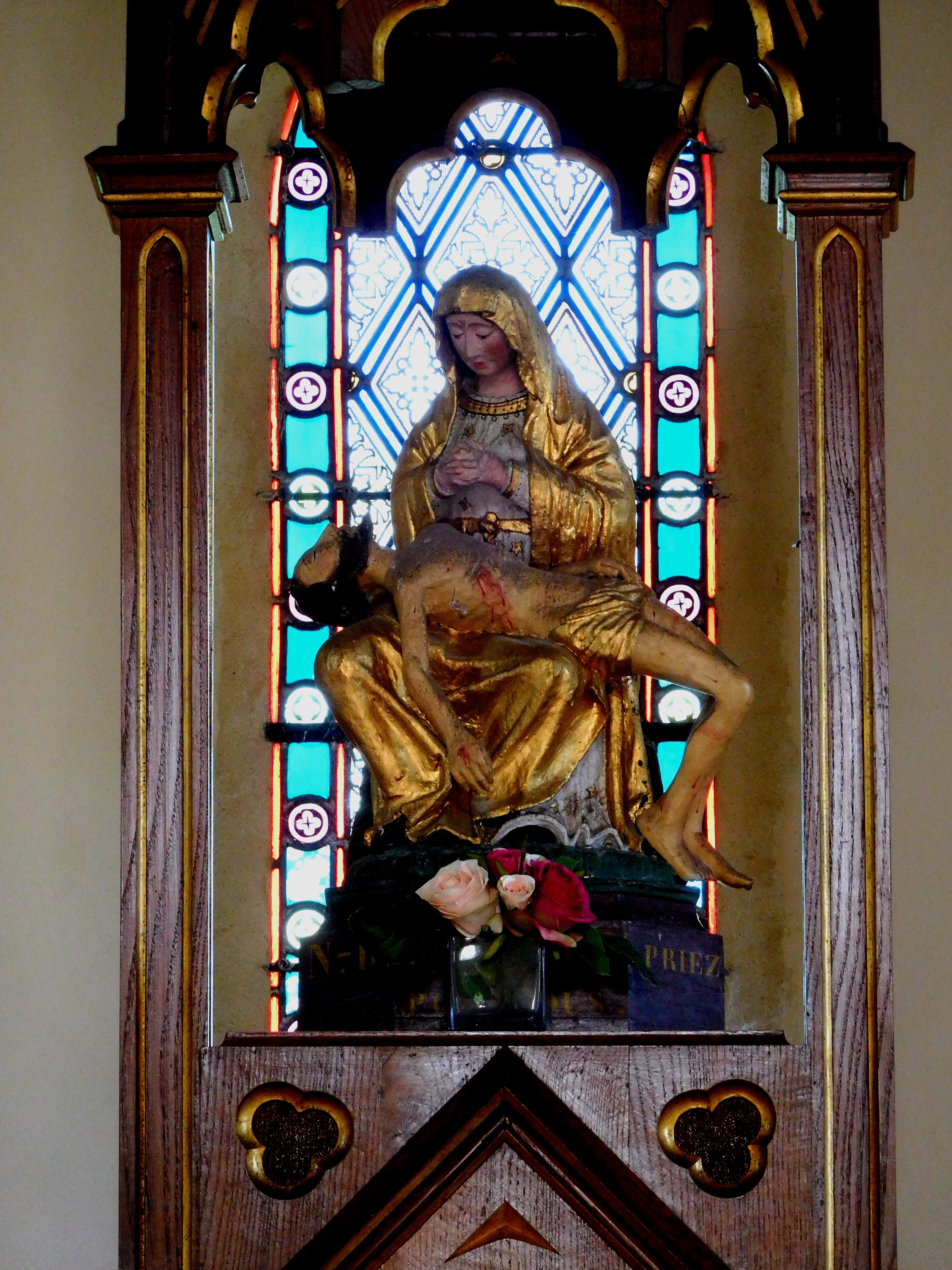 Statue de la Vierge « Notre-Dame-de-Provins » située dans la chapelle Notre-Dame-de-Pitié, à Annecy-le-Vieux.